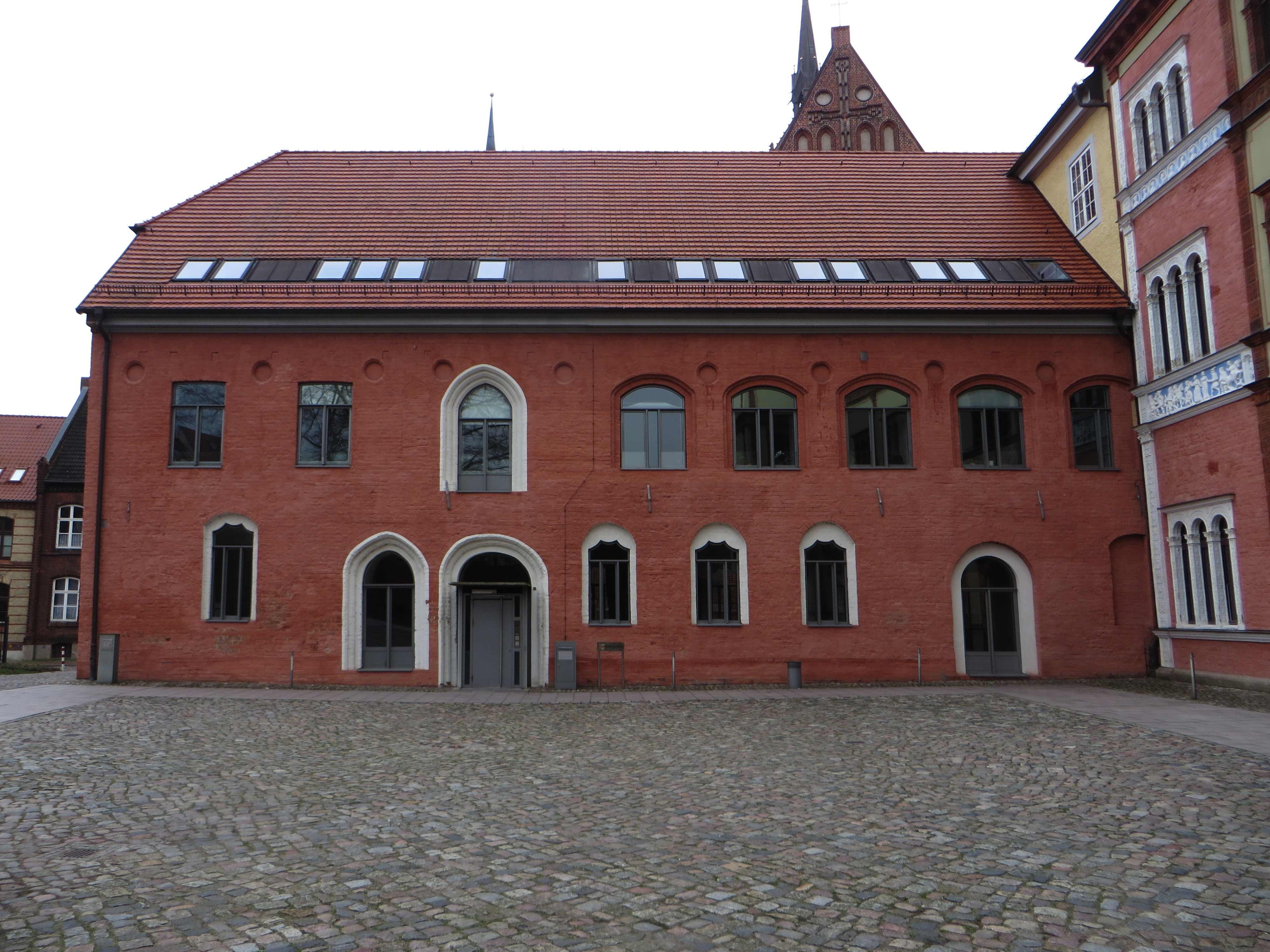 Gebäude des Amtsgerichts Wismar